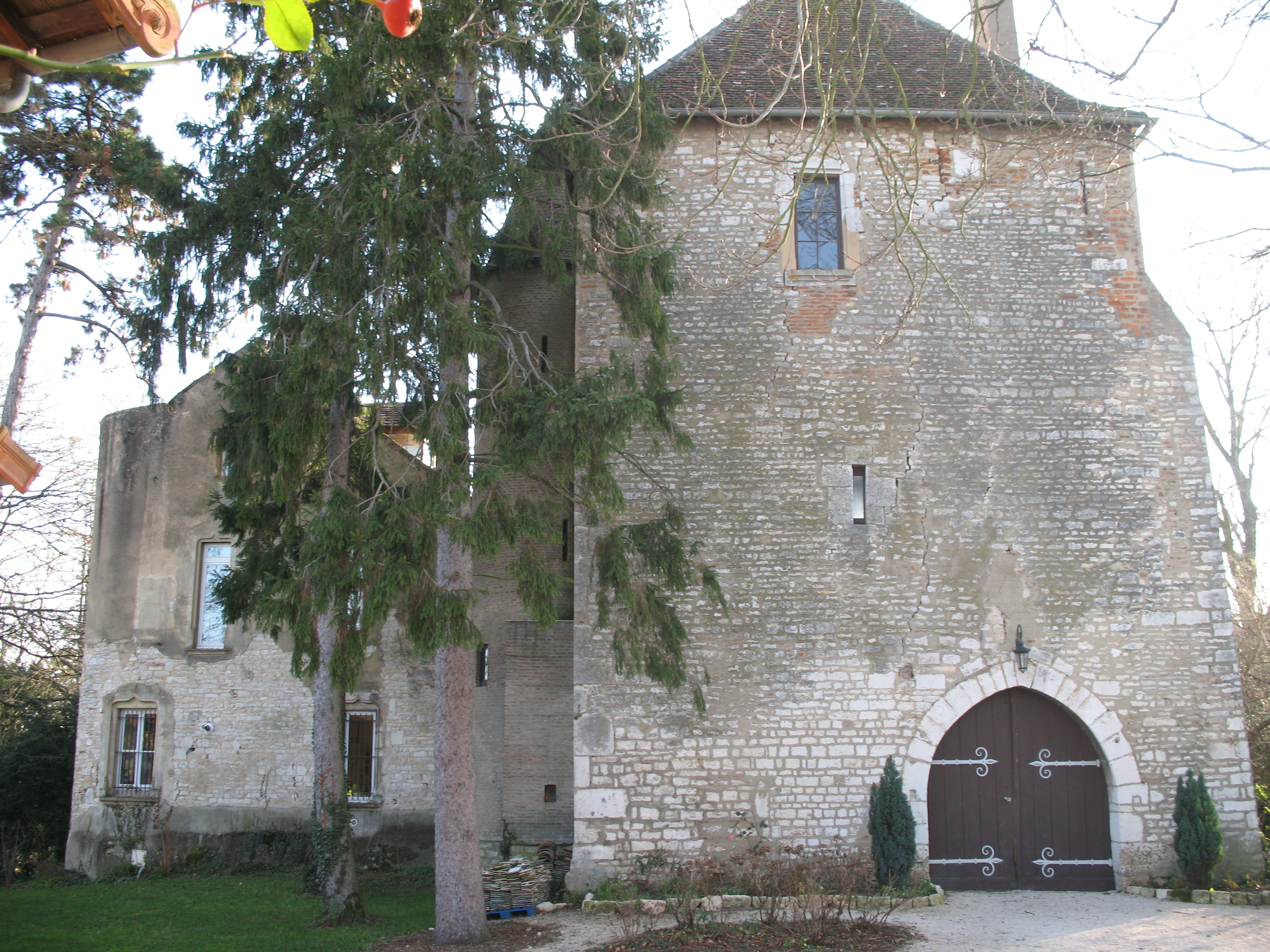 château de Champforgeuil (Saône-et-Loire)